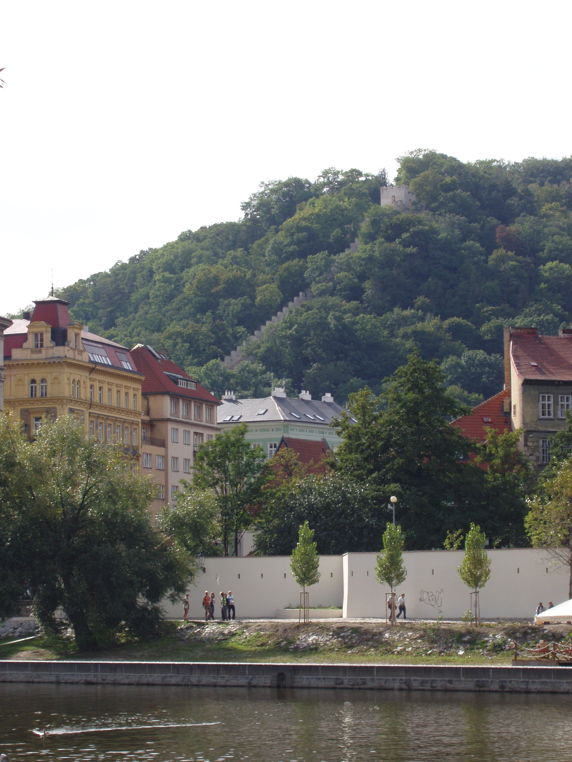 Hungermauer